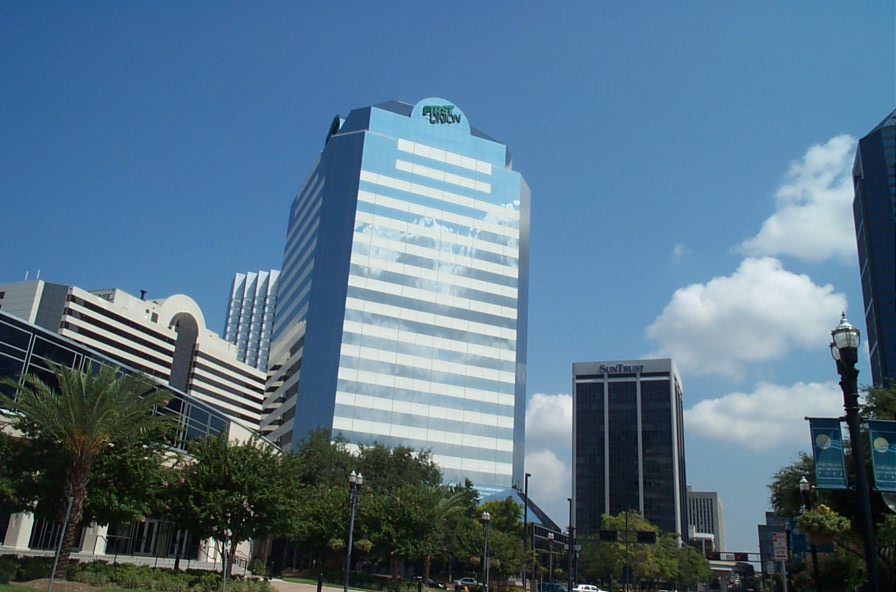 Jacksonville FL